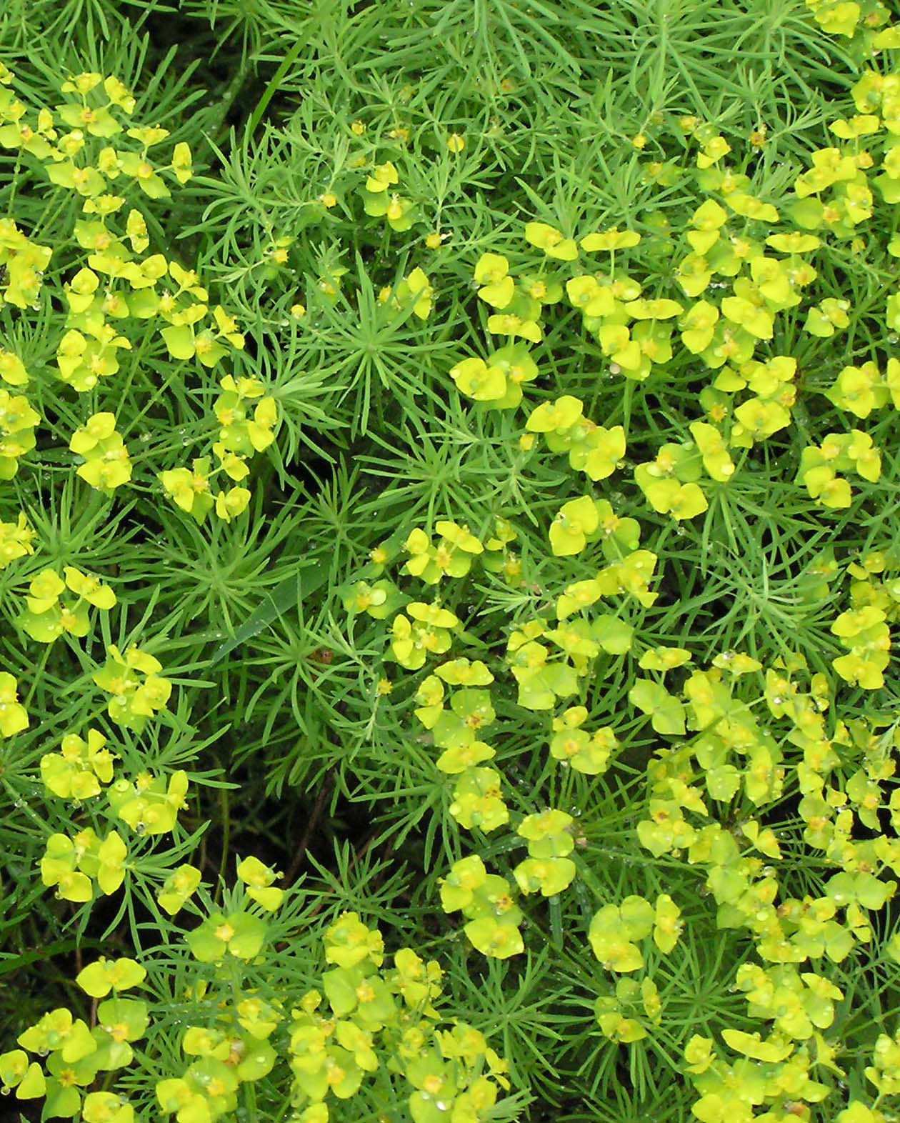 Zypressenwolfsmilch (Euphorbia cyparissias), Naturschutzgebiet Fritschlach, Karlsruhe